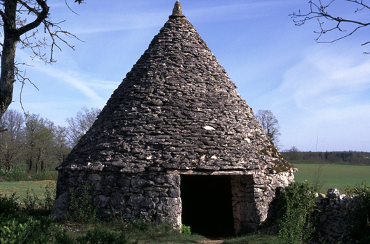 Cabane en pierre sèche située à Lalbenque (Lot), ayant servi autrefois de bergerie. C'est l'une des plus hautes et plus grandes du département du lot (5.30 m de hauteur pour 5 m de diamètre). Photo de Dominique Repérant.